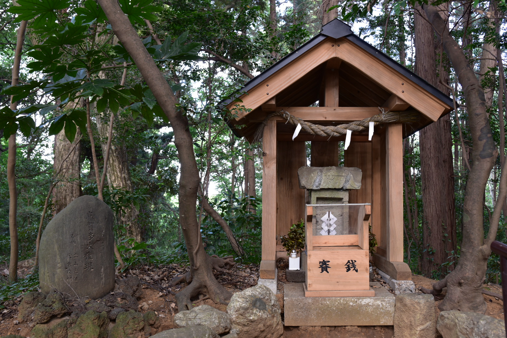 麻賀多神社(本宮)の摂社 大権現社の本殿